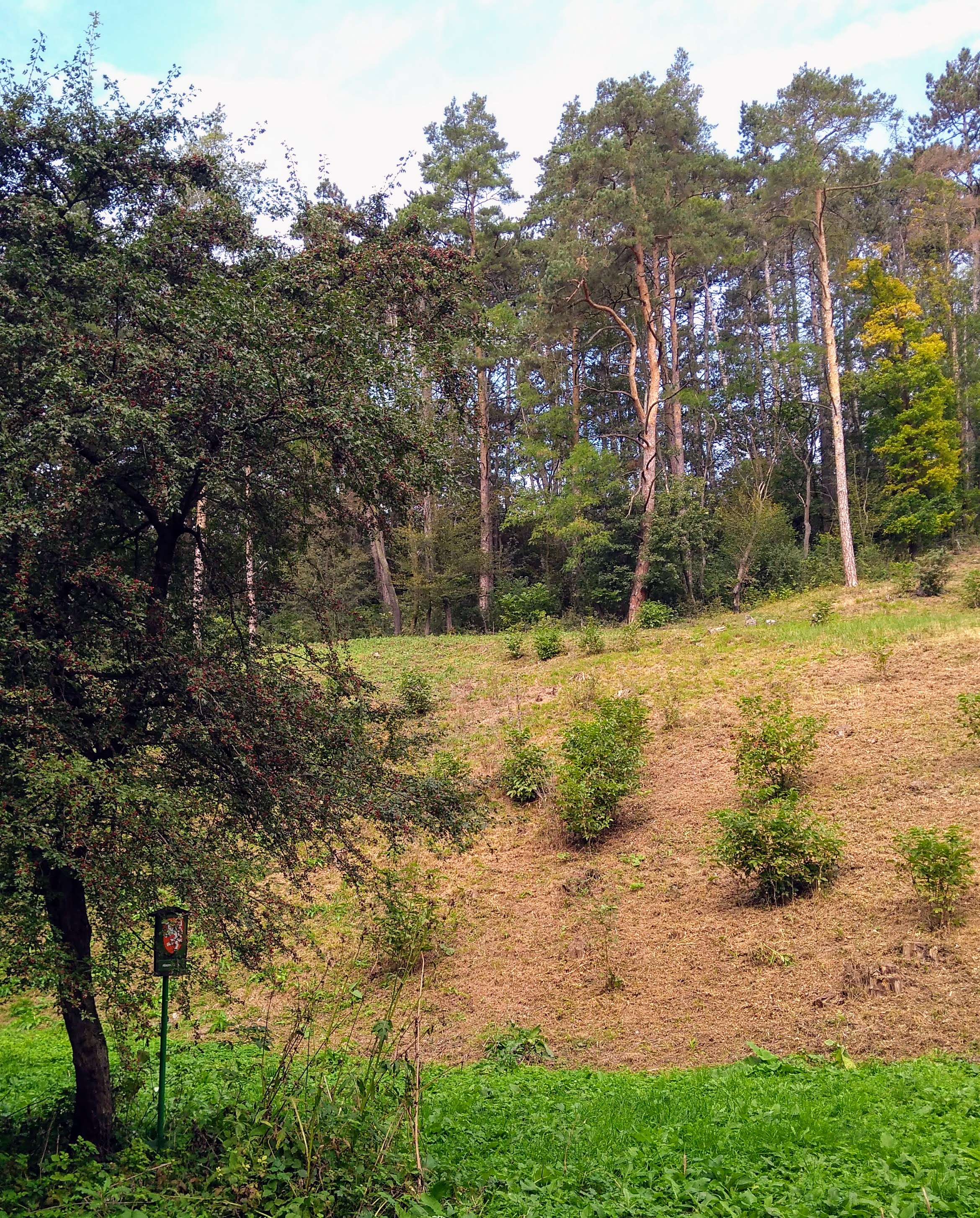 Cvrčovice (Zdounky), přírodní památka Včelín